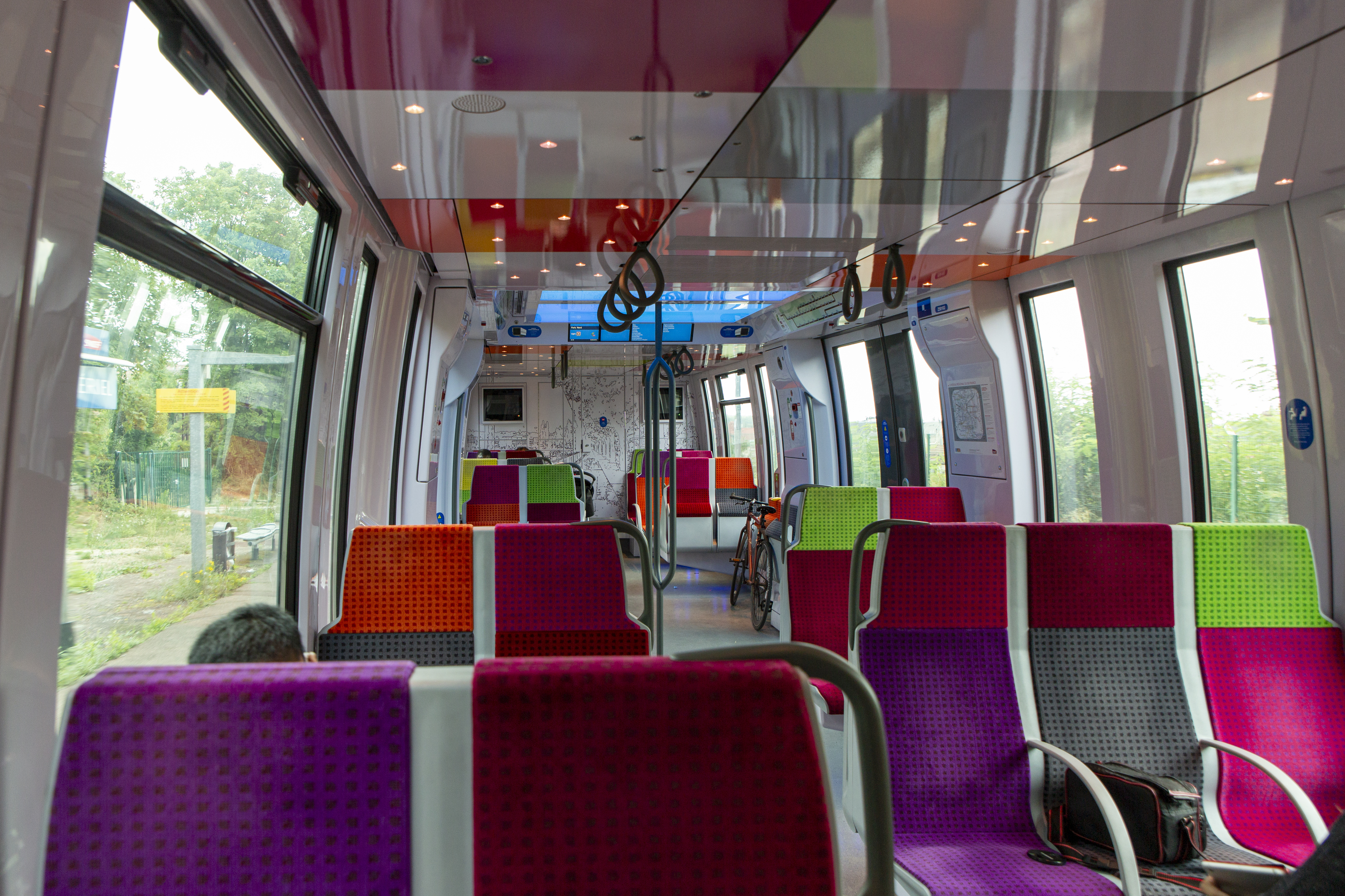 Intérieur d'une automotrice Z 50000 en gare de Mériel, Val-d'Oise, France.